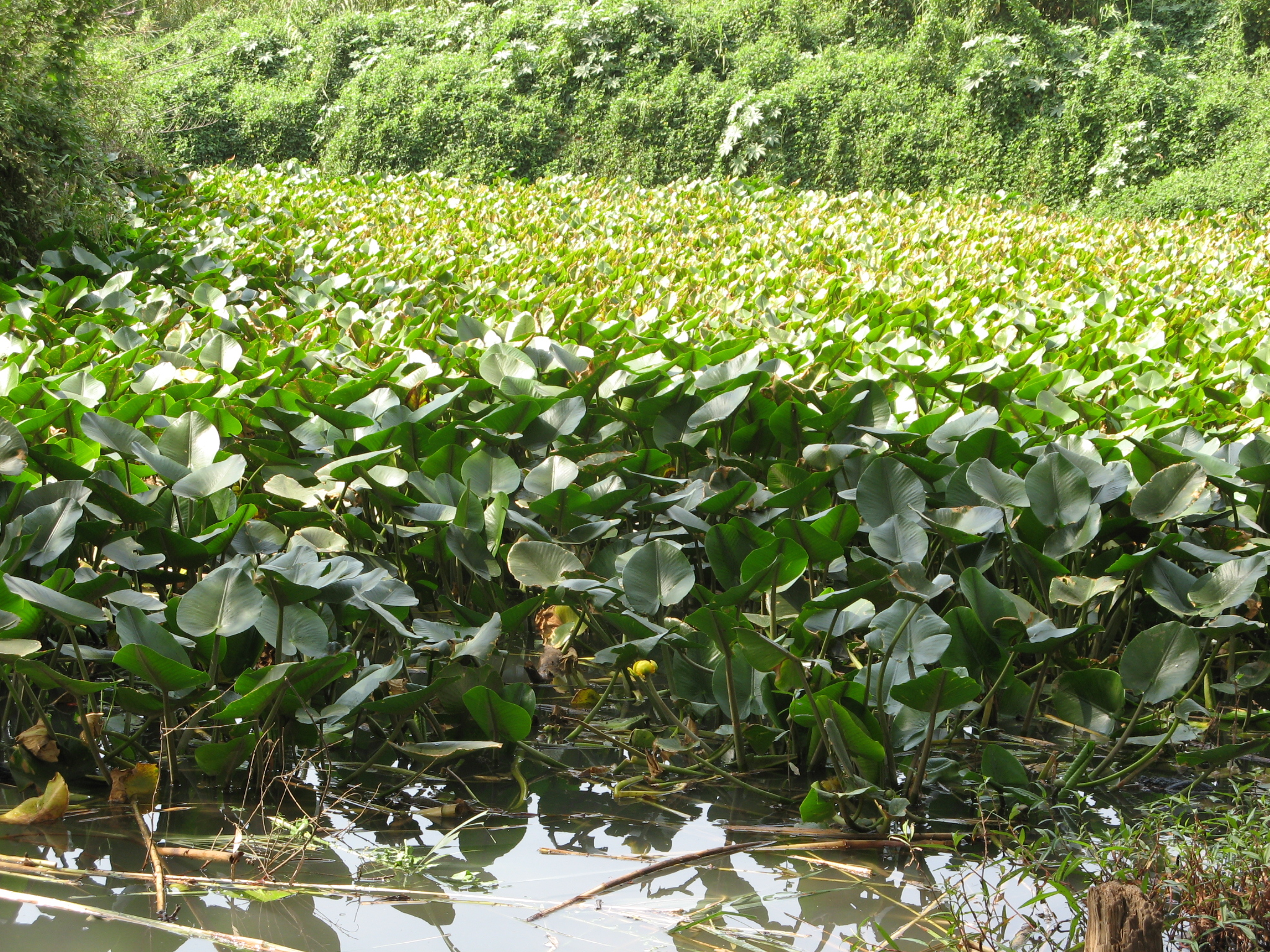 Nuphar lutea carpet in upper Yarkon, Israel